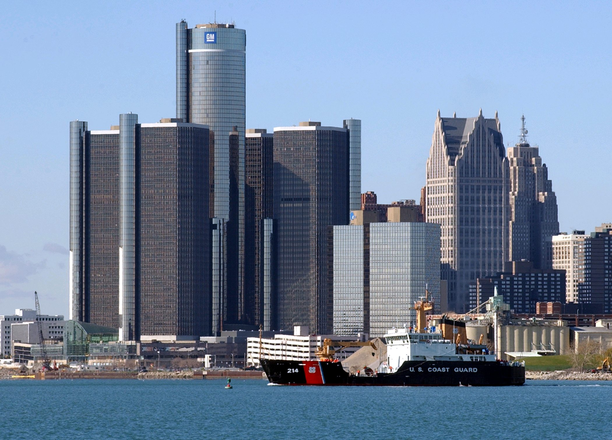 Rascacielos en Detroit PORT HURON, Mich, (Nov. 8, 2003) -- The Coast Guard Cutter Hollyhock (WLB-214) passes in front of downtown Detroit (Renaissance Center) on its way home to Port Huron, Mich., for the first time. From (taken from Image:Detroit_GM_headquarters.jpg) Hollyhock is the newest Juniper Class buoy tender and the first to be stationed on the Great Lakes. USCG photo by PAC Jeff Hall